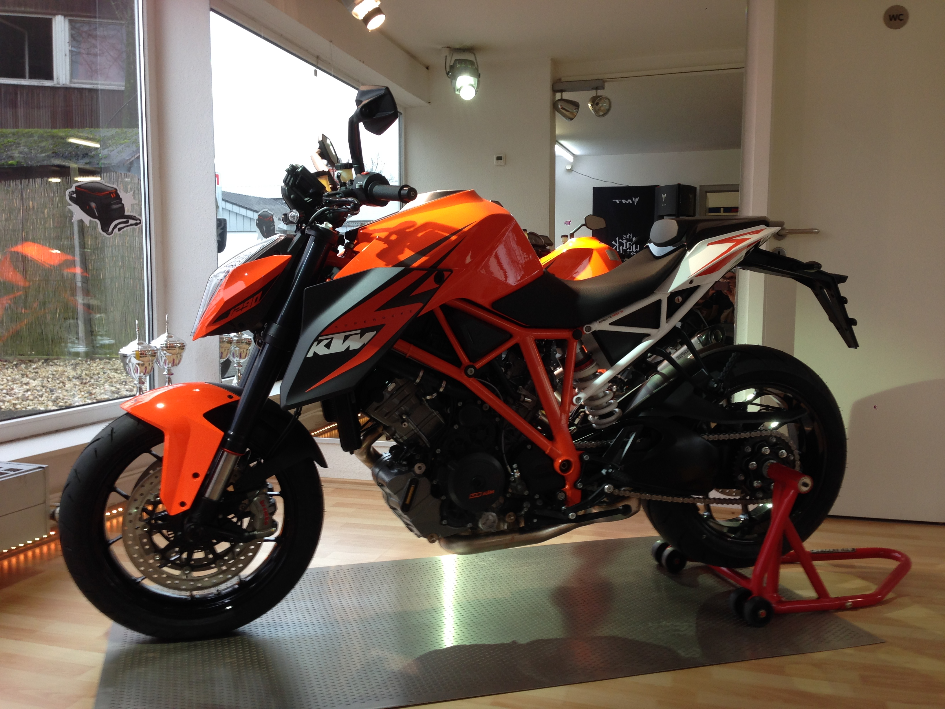 KTM 1290 Super Duke Seitenansicht 2